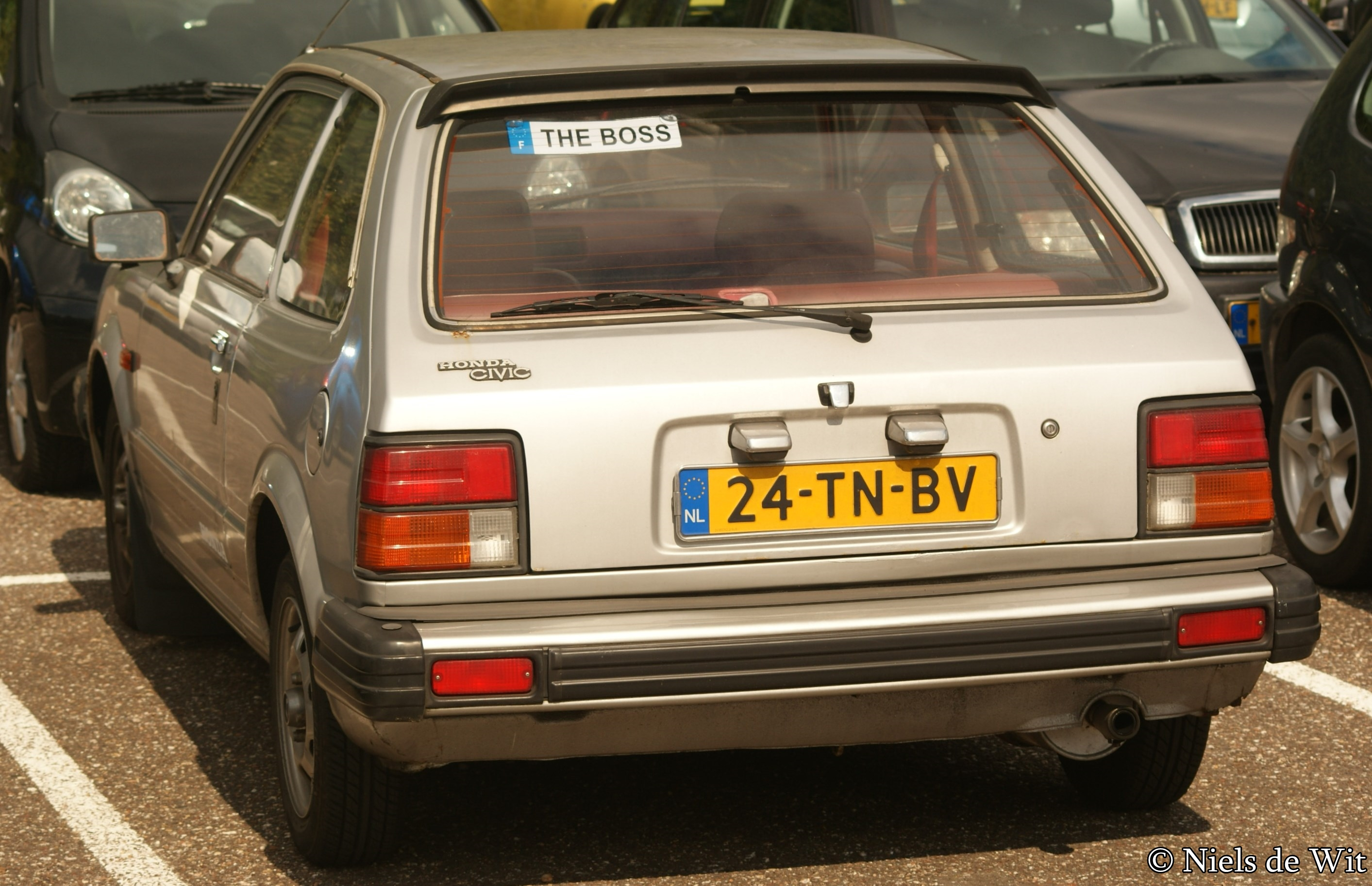 24-TN-BV